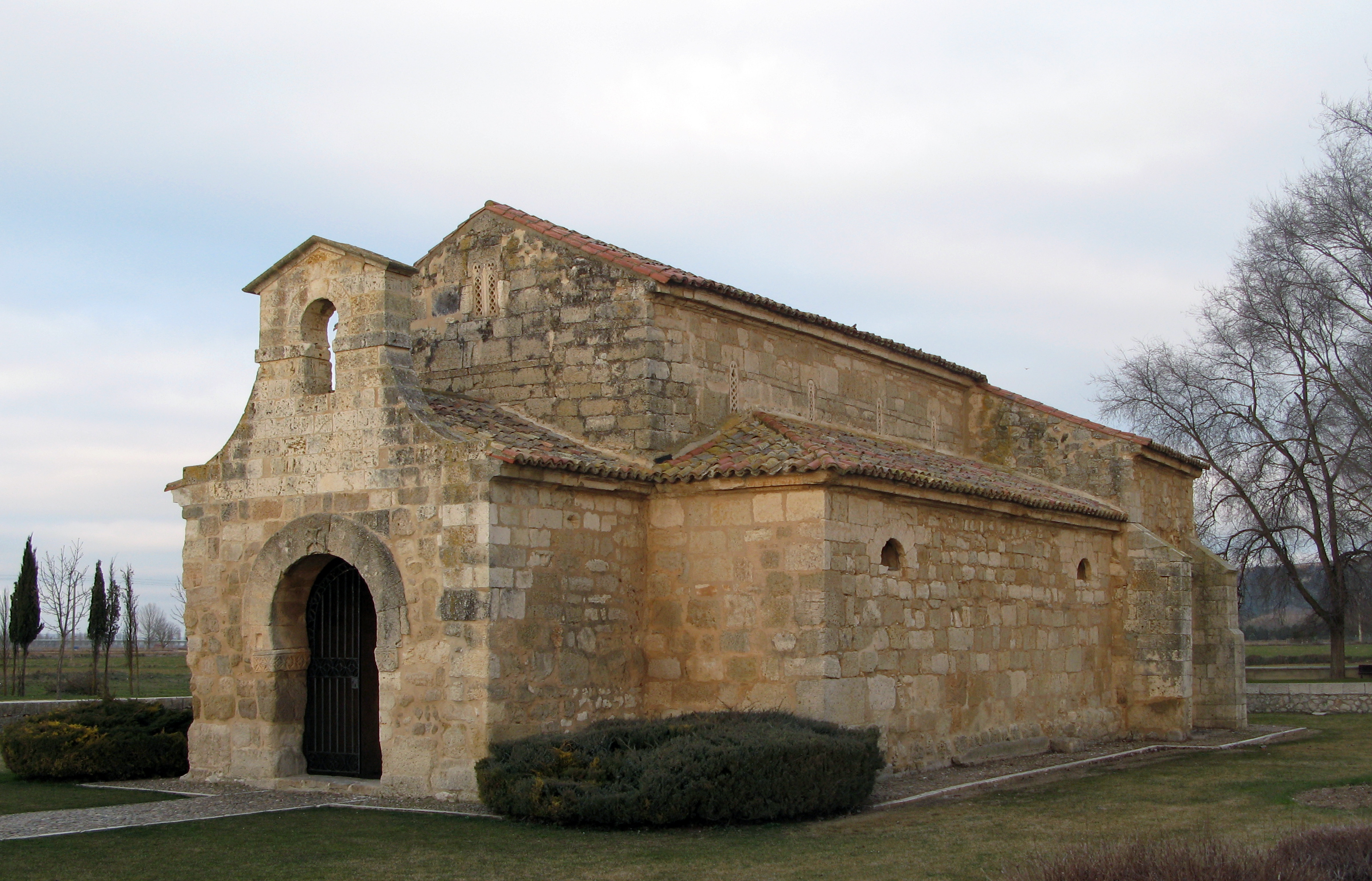 Iglesia visigoda de San Juan de Baños en la localidad de Baños de Cerrato, municipo de Venta de Baños, provincia de Palencia, Comunidad de Castilla y León, España